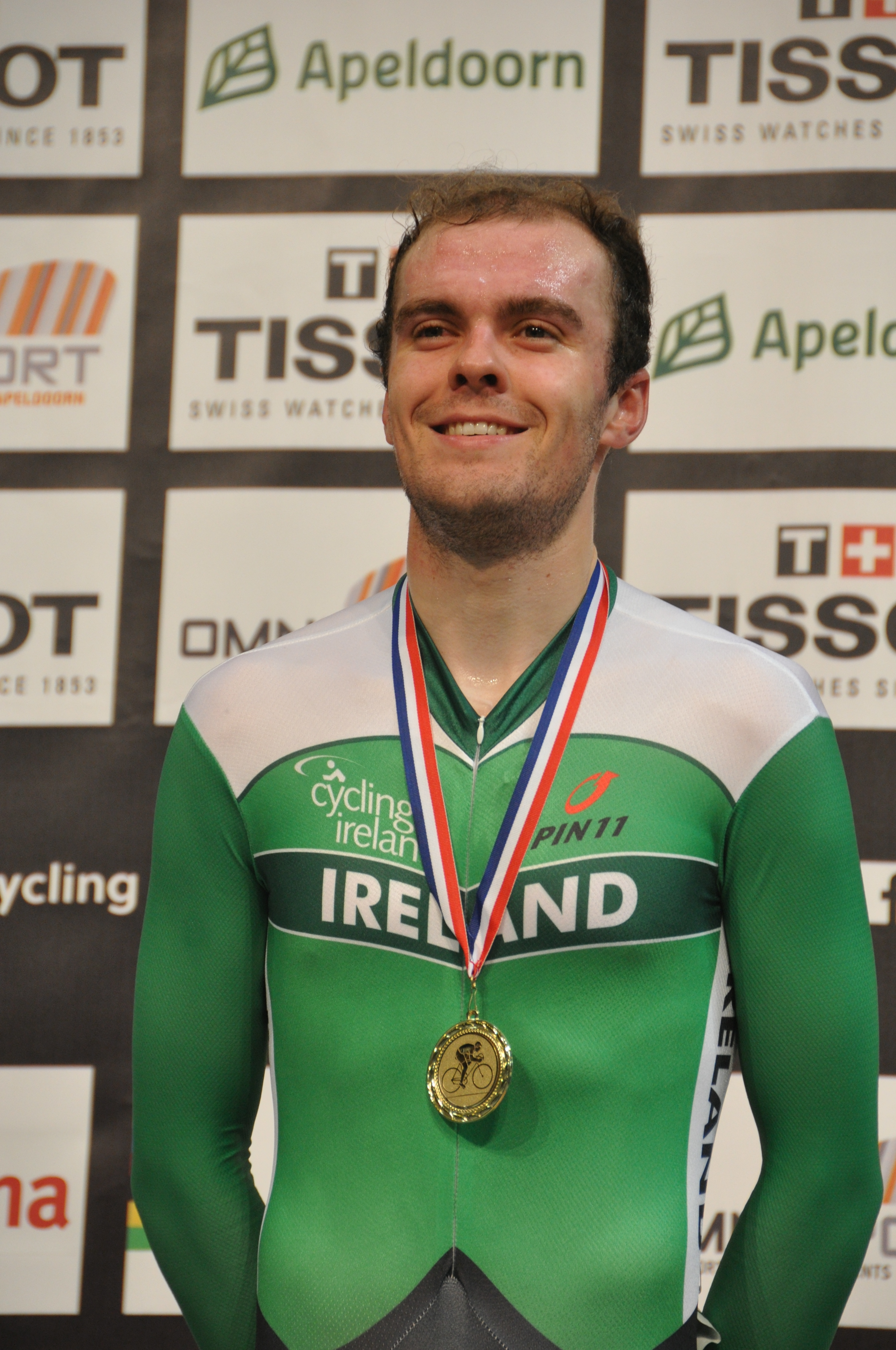 Mark Downey, irischer Radsportler, Gold im Punktefahren